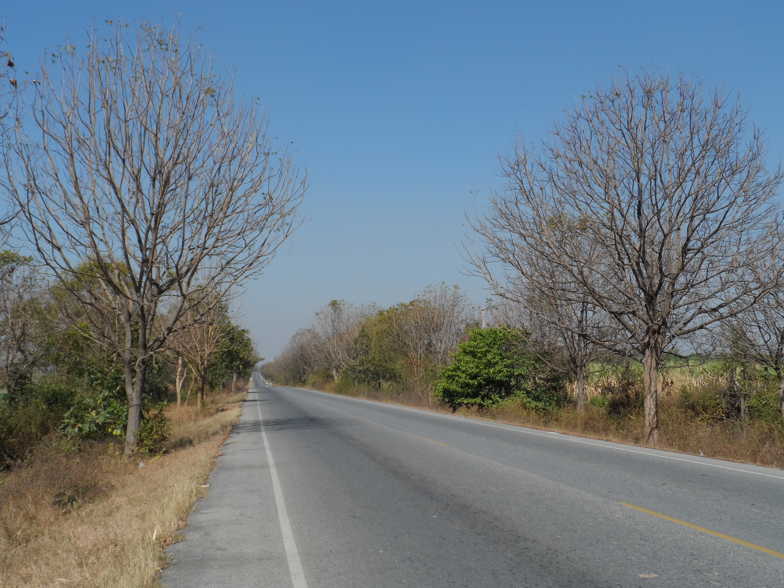 ทางหลวงหมายเลข 3306 บริเวณวัดเขาวัง อำเภอเลาขวัญ จังหวัดกาญจนบุรี